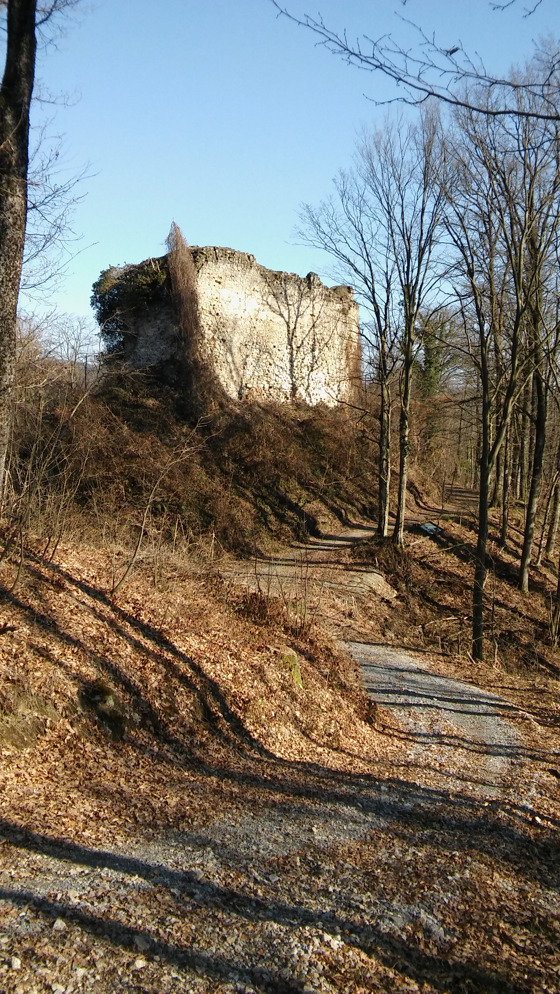 Burg Jelengrad